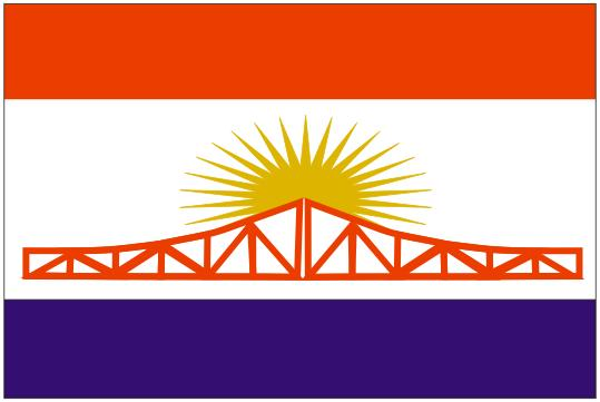 Bandera Carmelitana craada por Micol